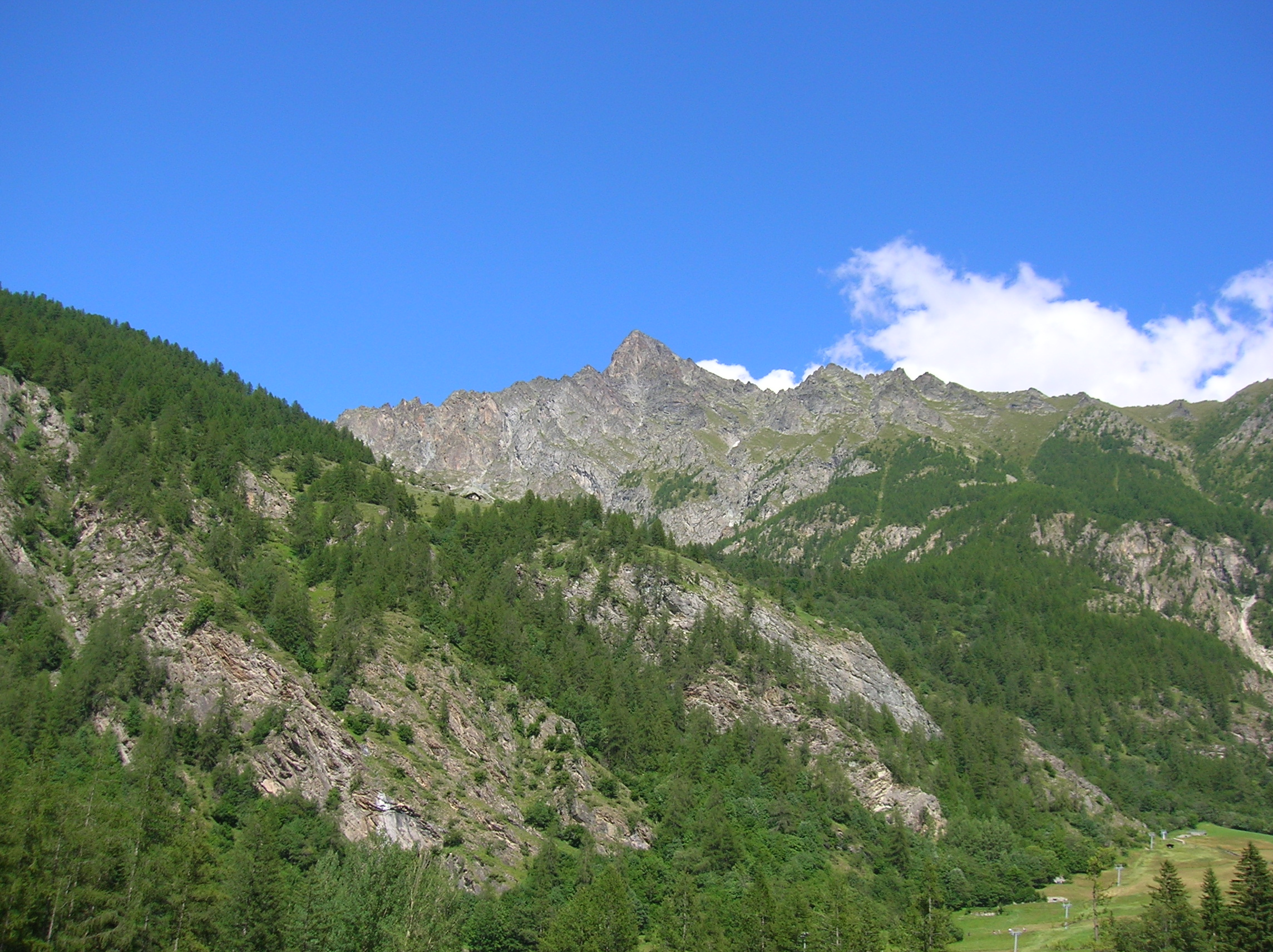 Monte Berrio visto da Ollomont, Valle d'Aosta, Italia.